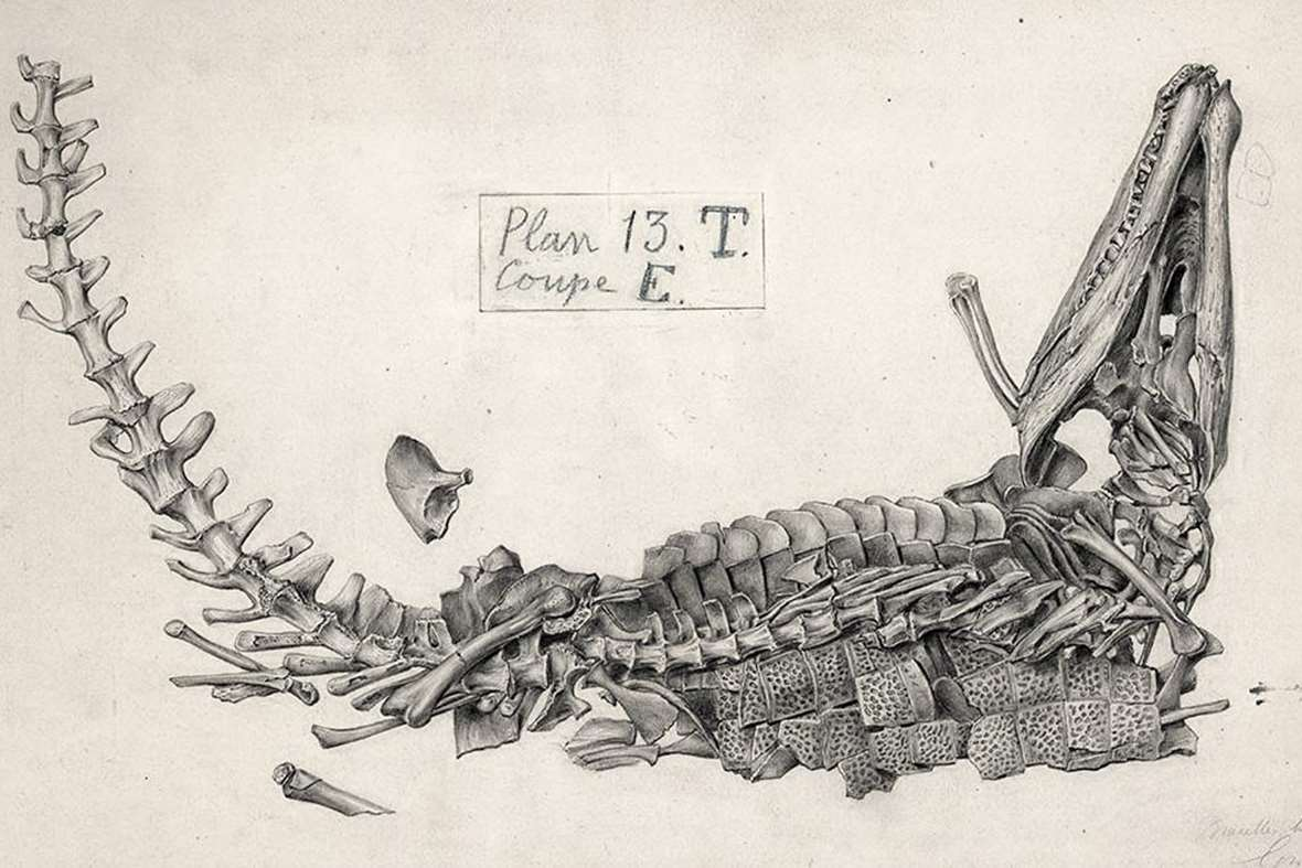 Tekening door Gustave Lavalette van Goniopholis crassidens (1882) zoals het ontdekt werd in de "Wealdiaanse" kleisteen van de "Cran du Midi" van Bernissart.